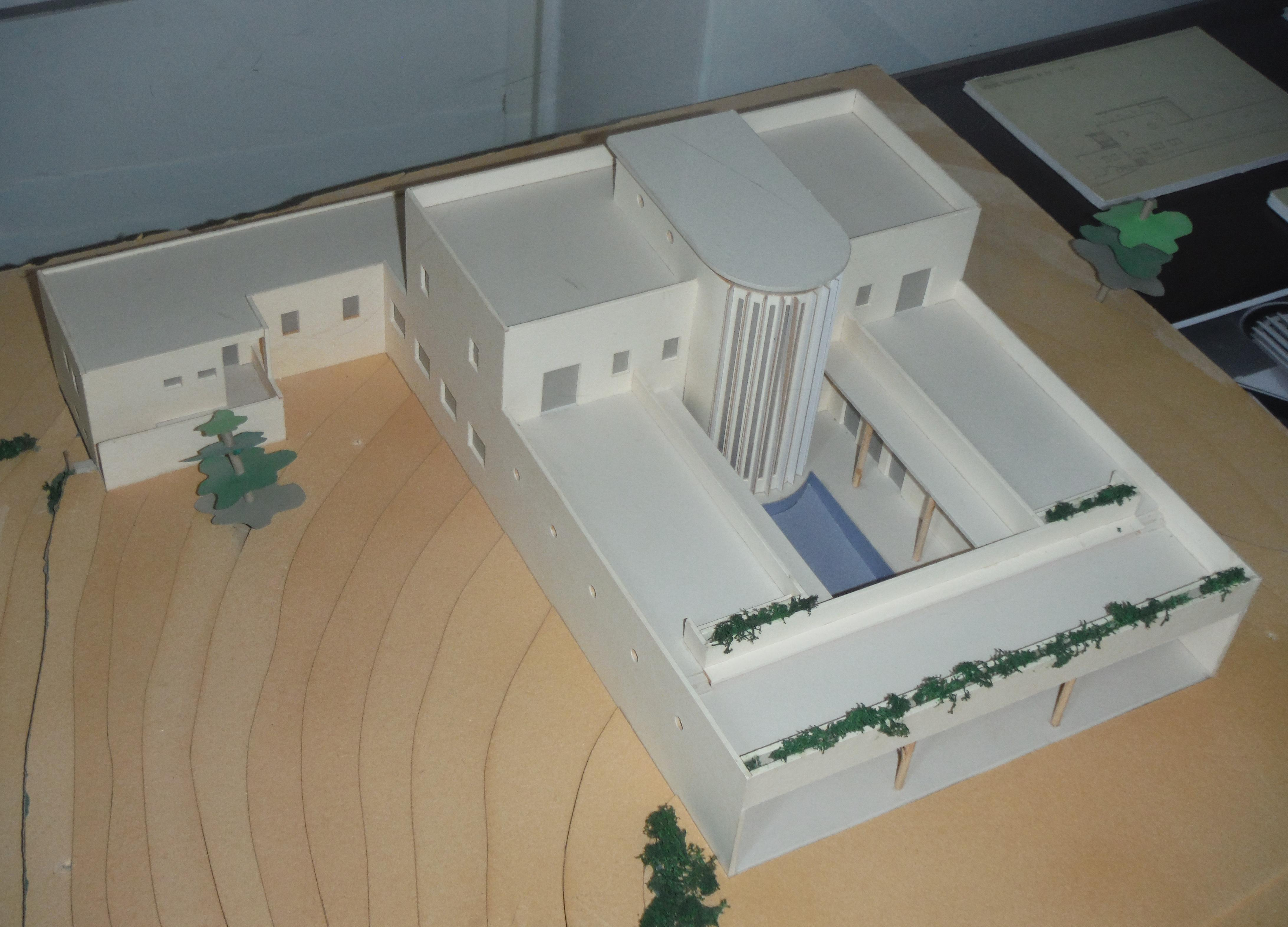 בית חיים ויצמן, דגם ארכיטקטוני, מבט מלמעלה